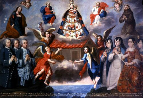 Virgen de Loreto en una casa que es levantada por ángeles y la acompañan Jesucristo, Dios Padre, San José, Francisco de Asis y seis querubines. Del lado izquierdo, don Felipe del Valle y sus dos hijos Pedro Alcántara y José Germán. A al derecha la madre María Ana de Vergara y sus hijas Ana Francisca, Josefa Francisca, Francisca Catarina.